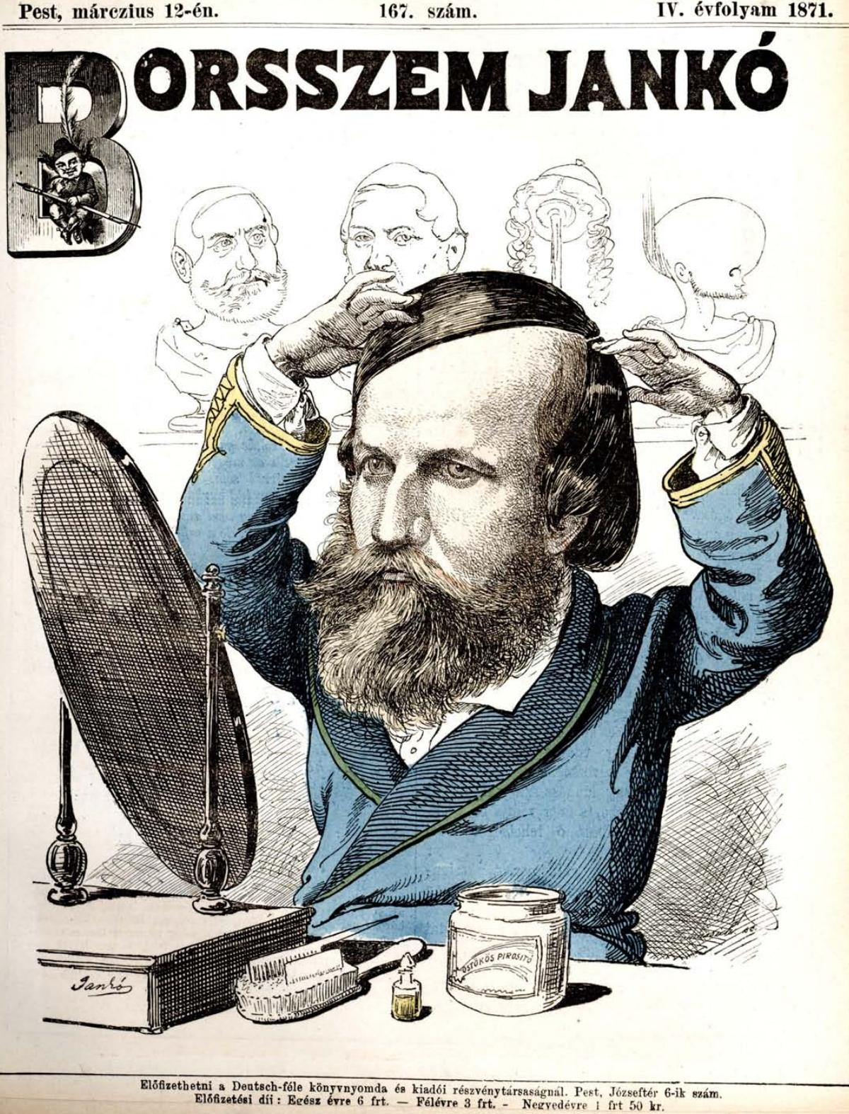 Parókai Jókai Mór. Gúnyrajz a Borsszem Jankó című élclapban